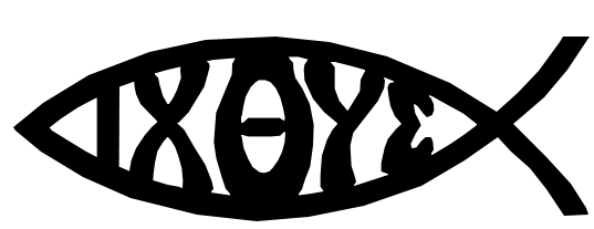 Ихтис (др.-греч. Ίχθύς — рыба) — древний акроним (монограмма) имени Иисуса Христа, состоящий из начальных букв слов: Ἰησοὺς Χριστὸς Θεoὺ ῾Υιὸς Σωτήρ (Иисус Христос Божий Сын Спаситель). Часто изображалась аллегорическим образом — в виде рыбы.